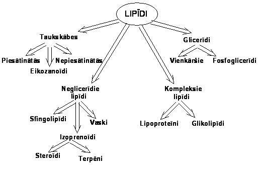 Lipīdu iedalījums pēc to ķīmiskā sastāva.